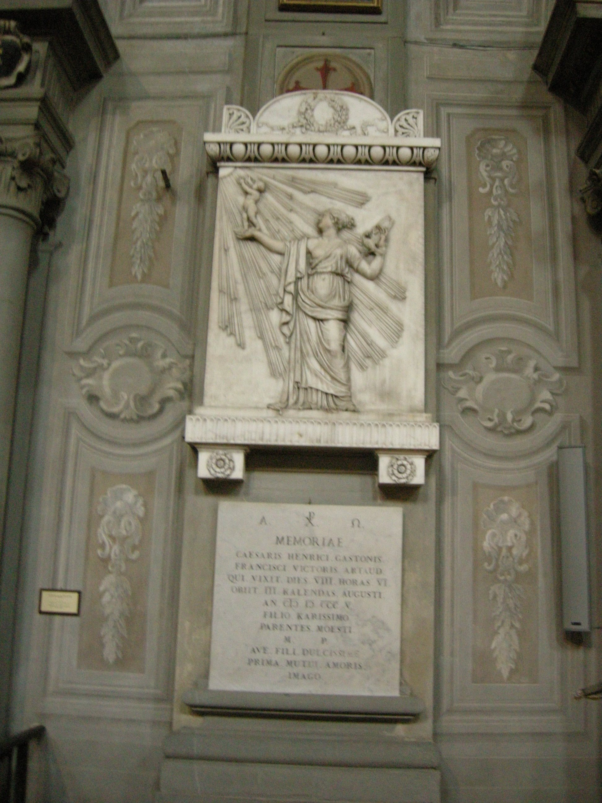 Ognissanti, tomba cesare artaud